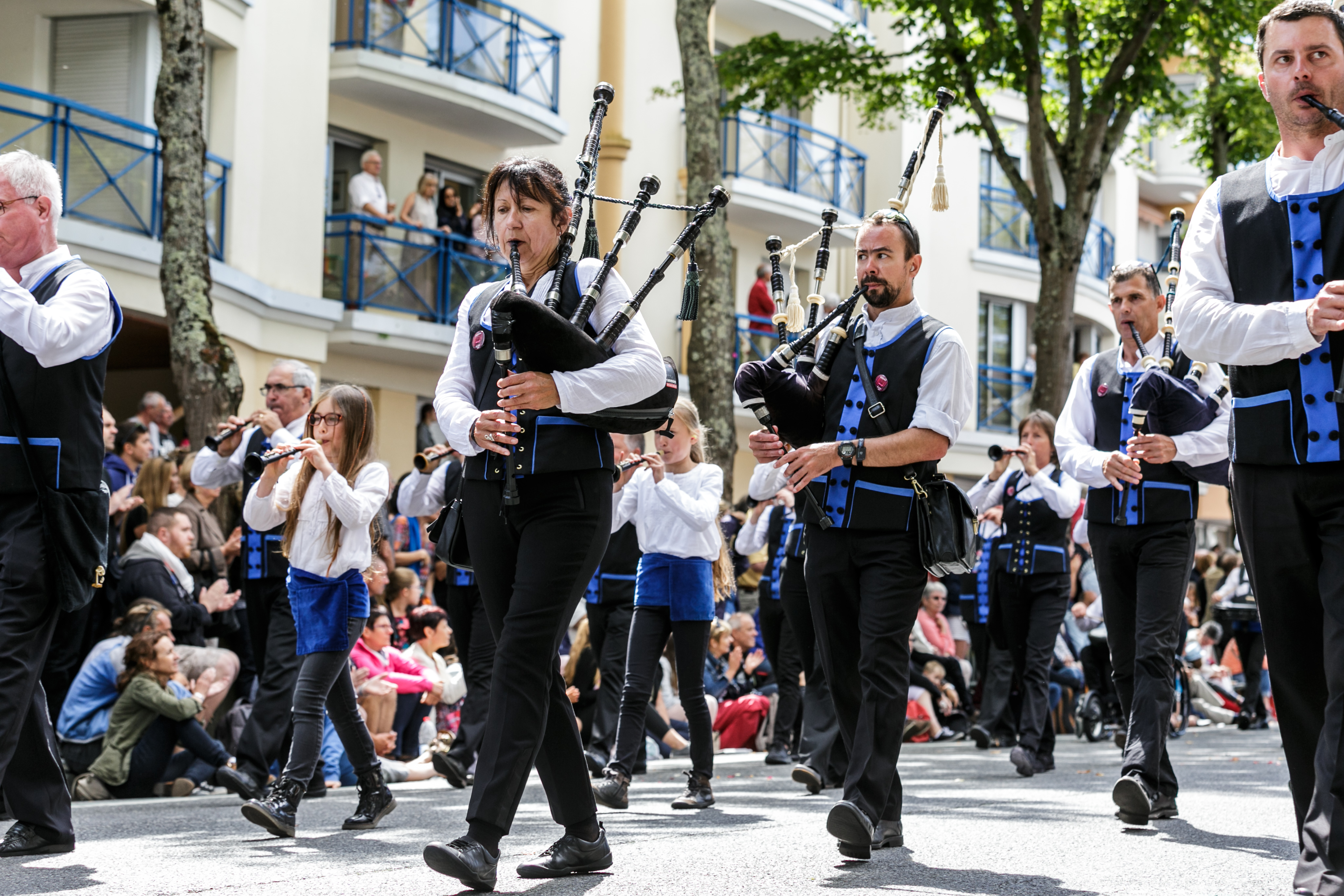 Festival Interceltique de Lorient 2017 - Grande parade des nations celtes - Bagad Sonerien Plañvour (Ploemeur)